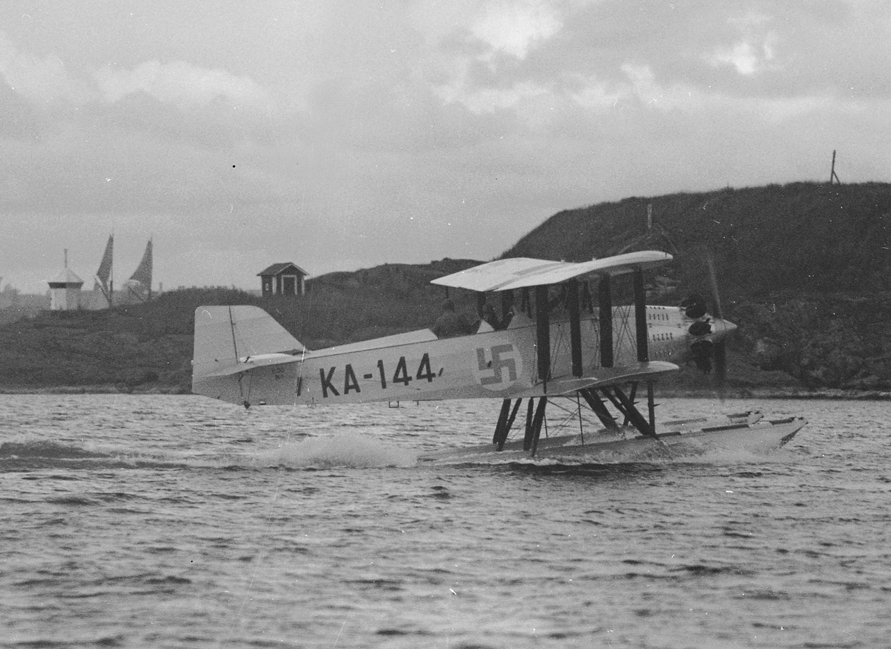 Valtion Lentokonetehtaan valmistaman V.L. E.30 Kotkan prototyyppi KA-144 rullauskokeissa Suomenlinnan edustalla lokakuussa 1930. Ensilennon prototyypillä suoritti Eljas Mäkelä 1.10.1930. Rajaus isommasta kuvasta (lasinegatiivi).